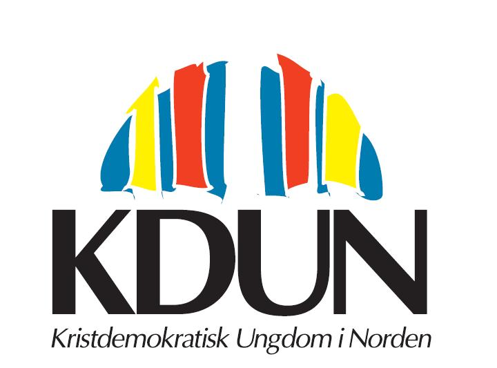 The logo of KDUN